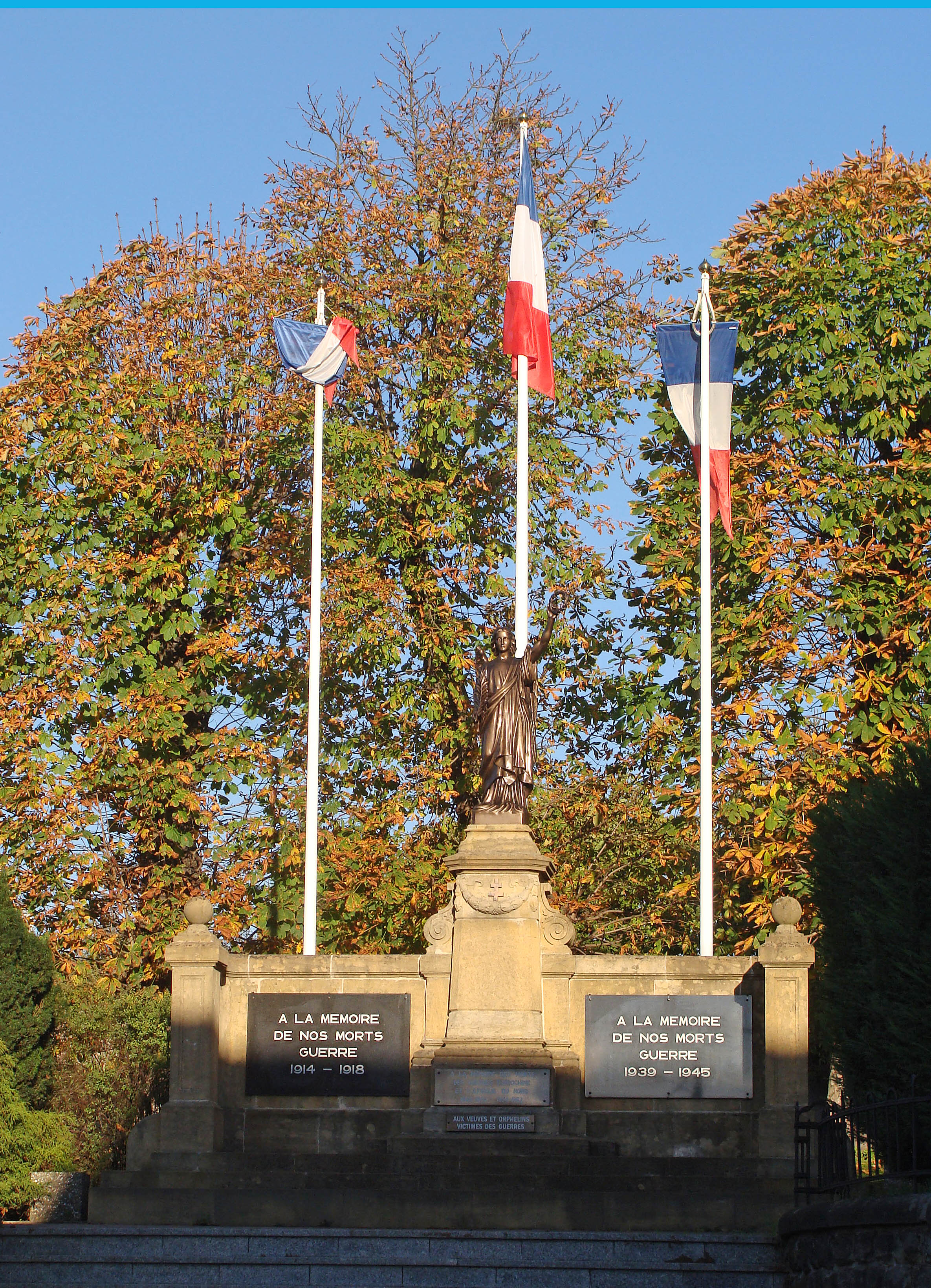 Monument aux morts de L'Hôpital (Moselle)